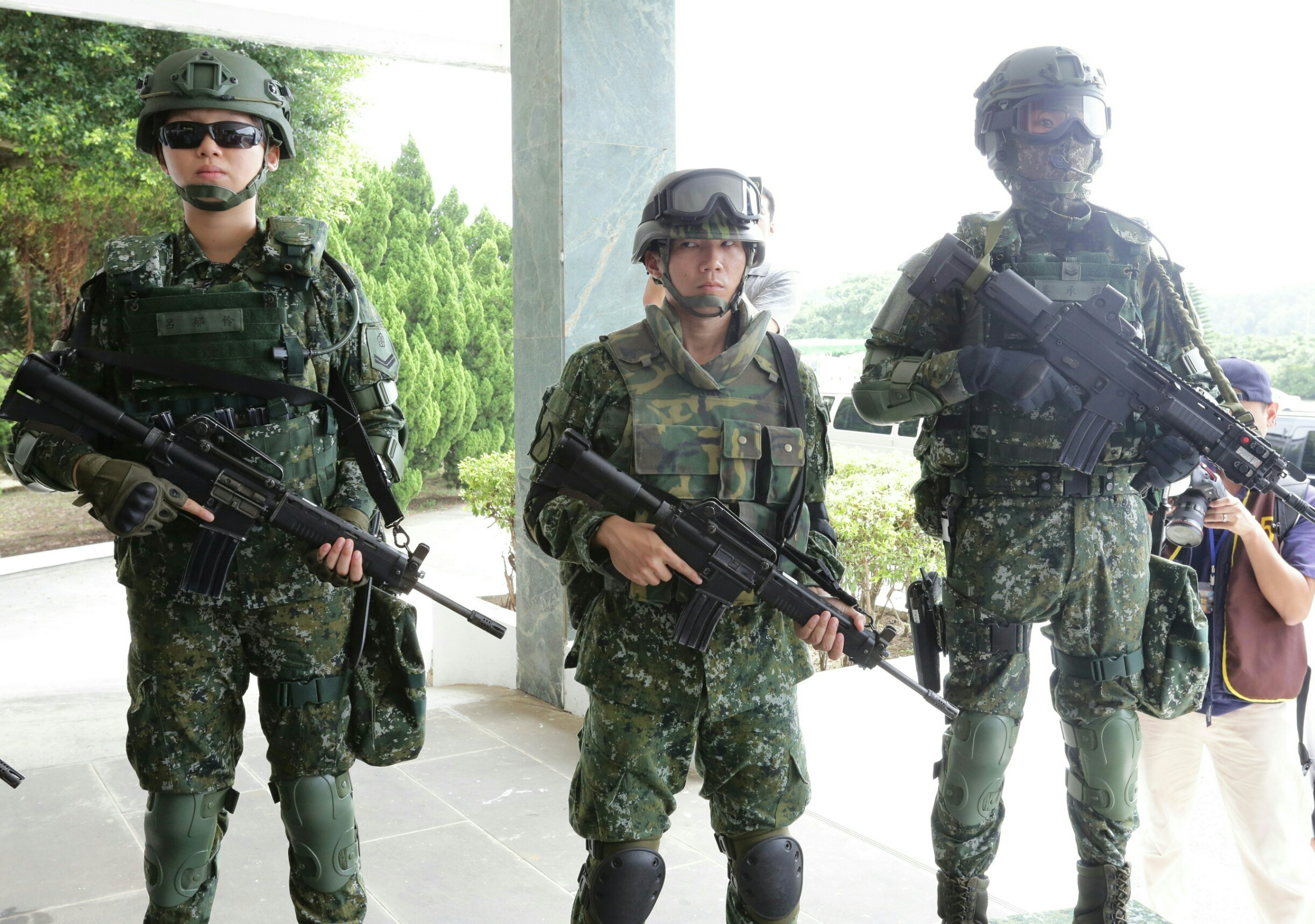 09.12 陸軍裝甲542旅展示新裝備 授權方式及範圍：中華民國總統府│政府網站資料開放宣告